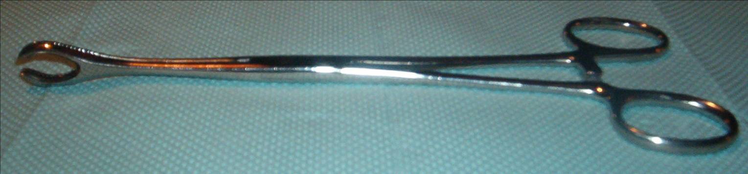 slotted Foerster forceps